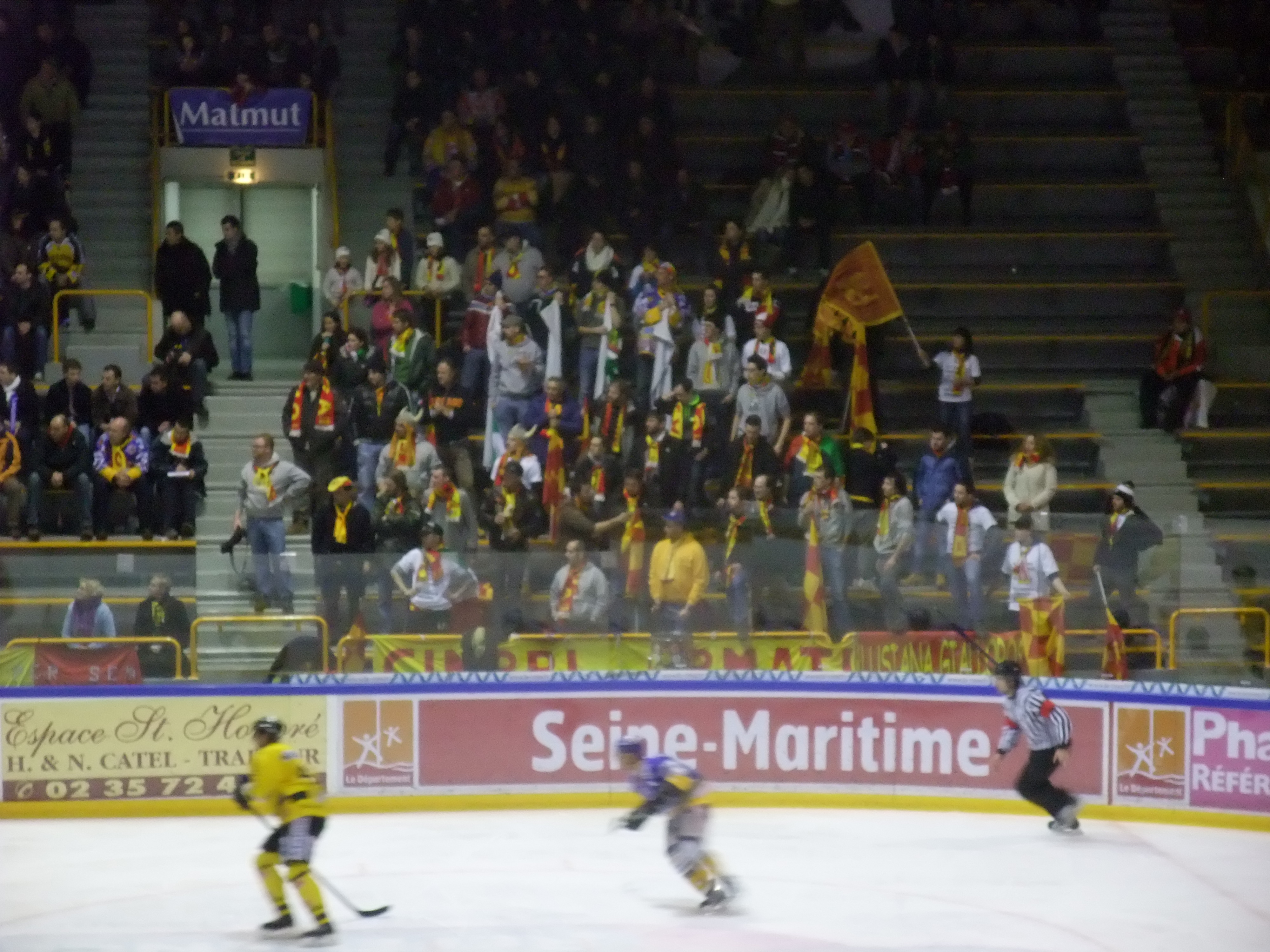 Supporters de l'Associazione Sportiva Asiago Hockey lors de la Coupe Continentale 2012 jouée à Rouen